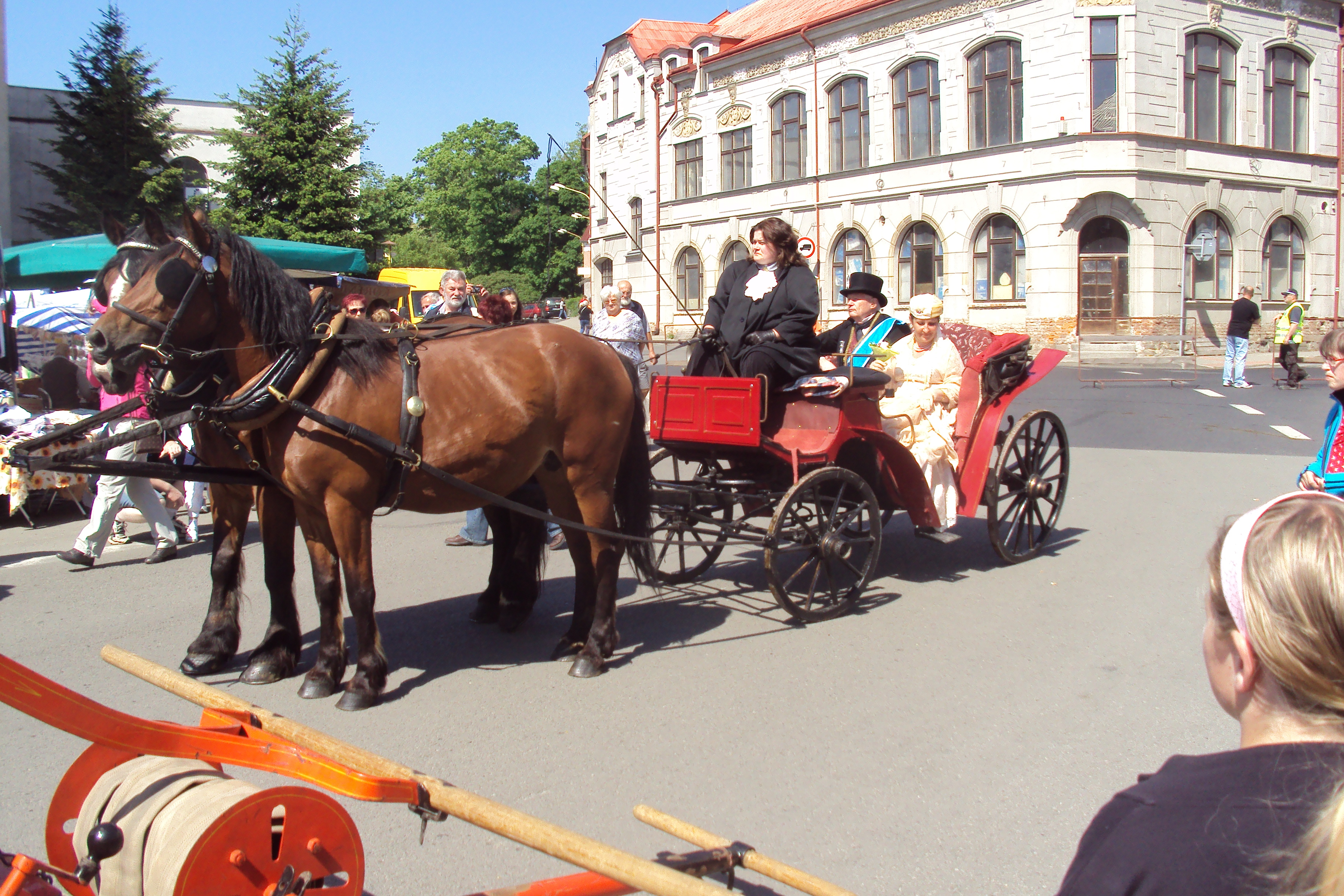 Na Císařské slavnosti přijel "císař" se svou chotí v kočáře